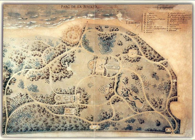 Plan of Palanga Garden.